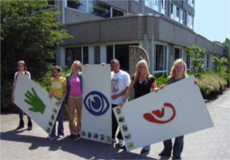 Pictorius Berufskolleg - Borkener Straße